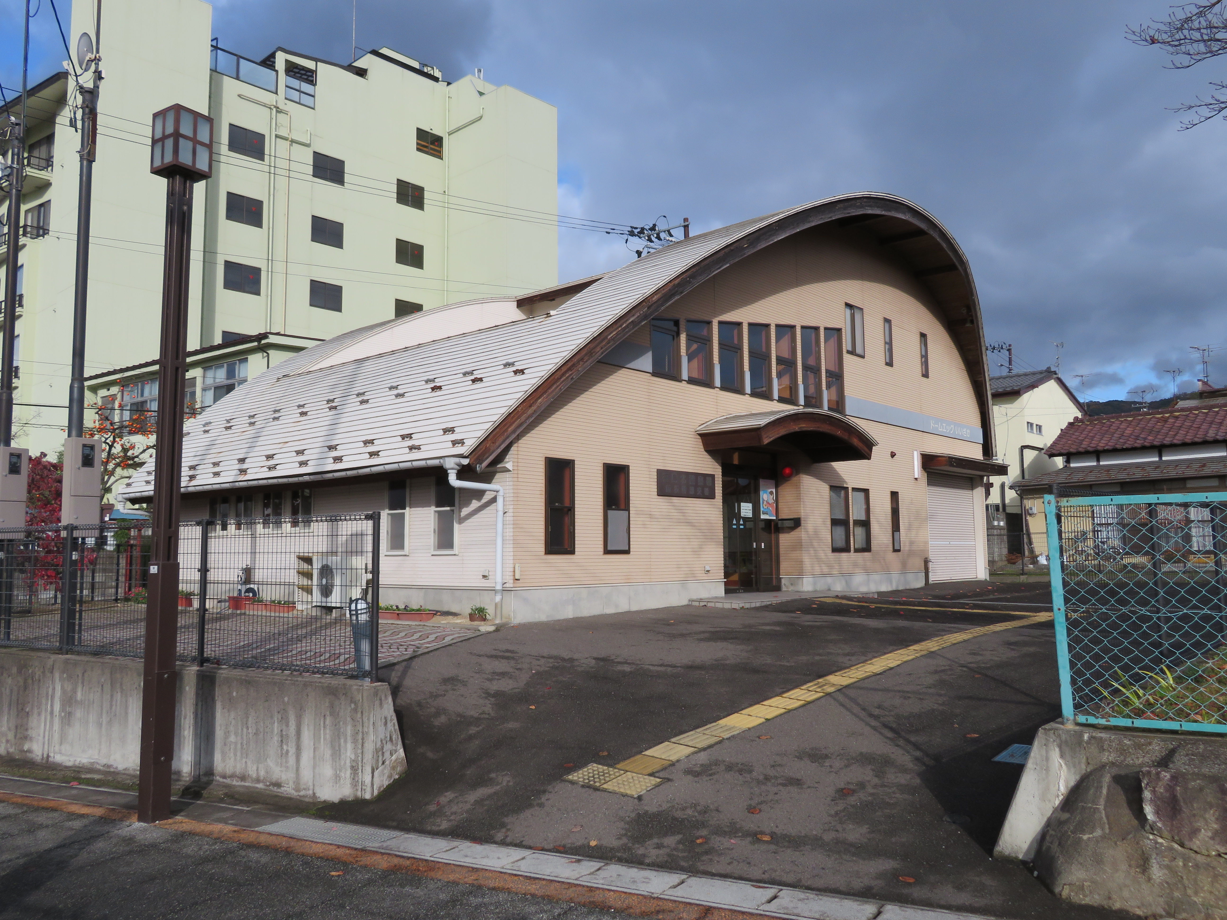 福島北警察署飯坂幹部交番庁舎